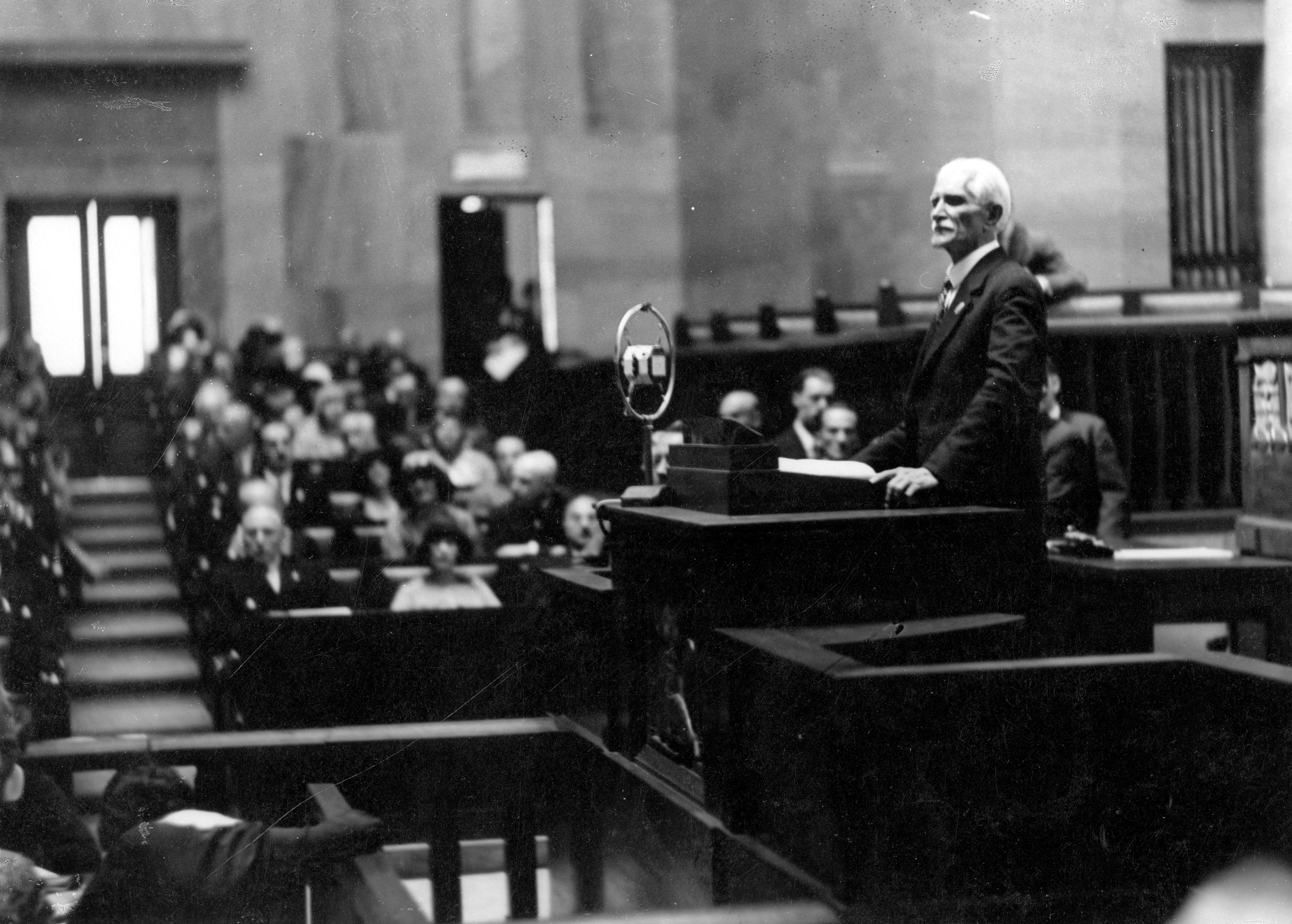 Otwarcie Kongres PEN Clubów w sali Sejmu – przemawia marszałek Sejmu Ignacy Daszyński.